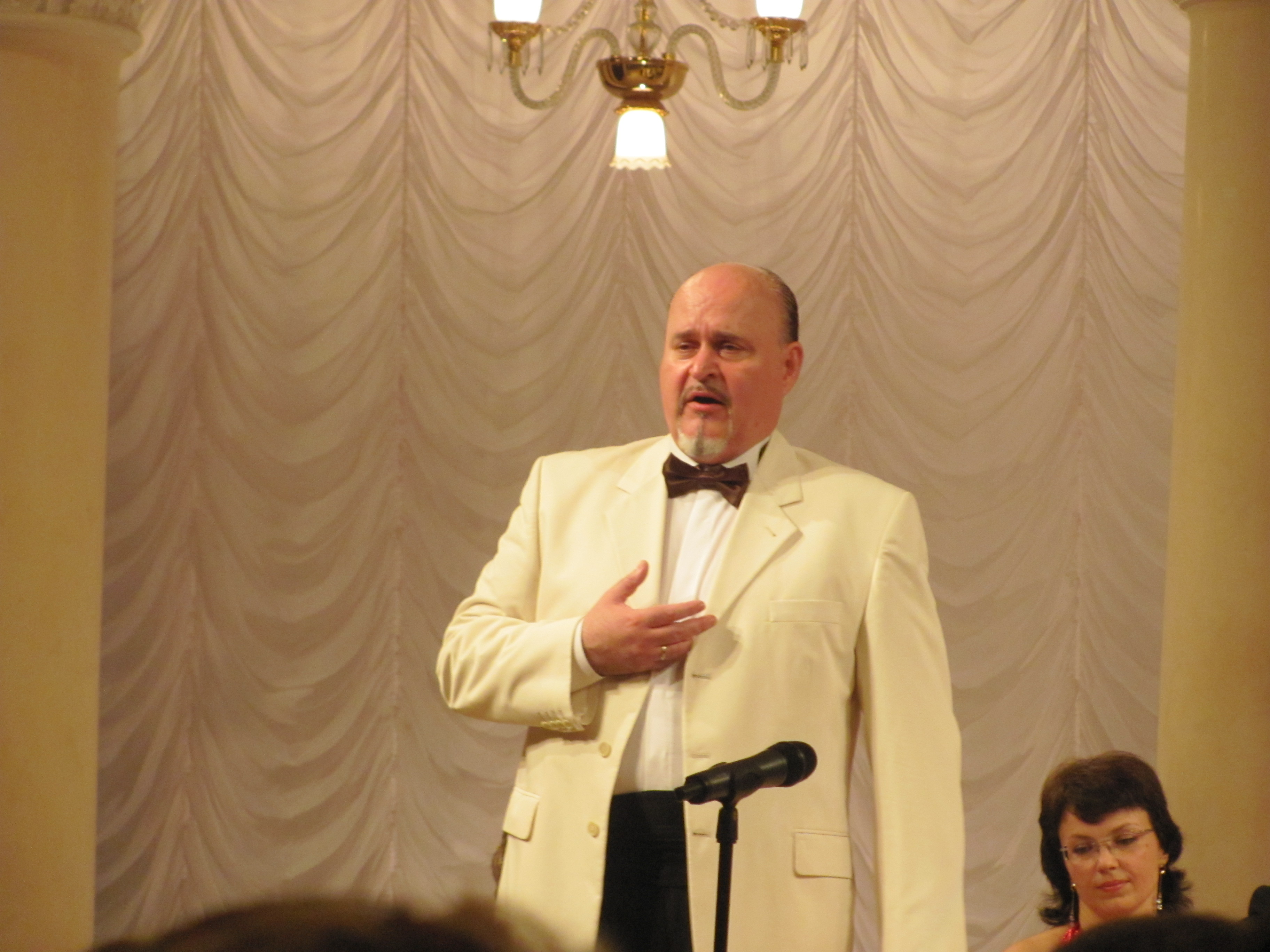 Сольний концерт народного артиста України Ігоря Борка у колонному залі імені М.В.Лисенка Національної філармонії України. м.Київ, 23.05.2012